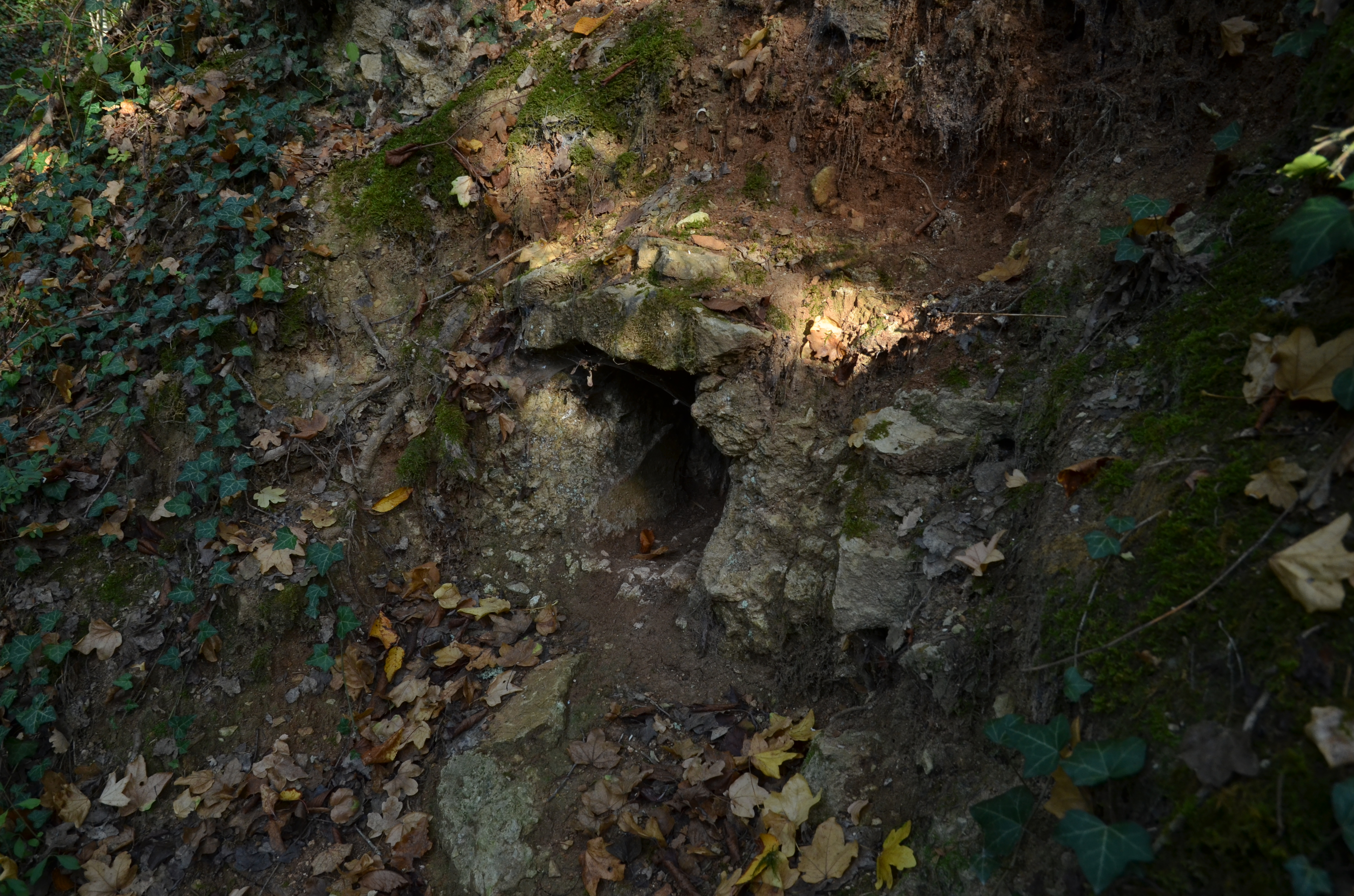 Vestige de l'aqueduc gallo-romain passant à la Tranchasse (Cher)